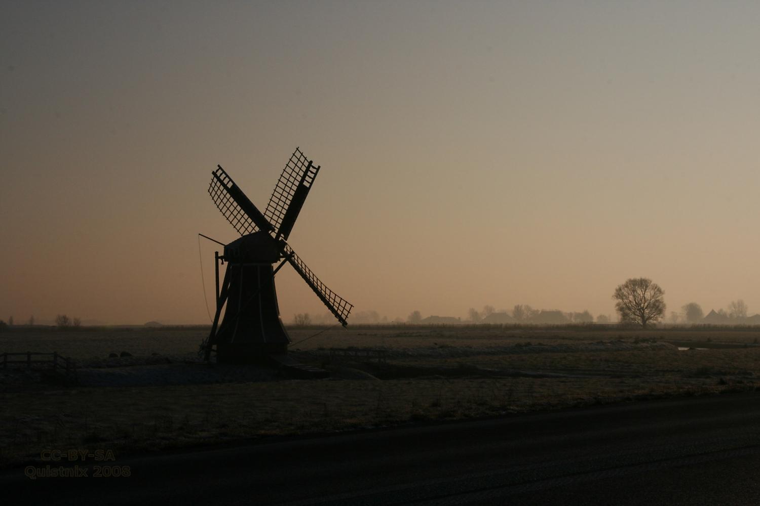 Winsum: molen Langwert in de late middagzon (tegenlicht)